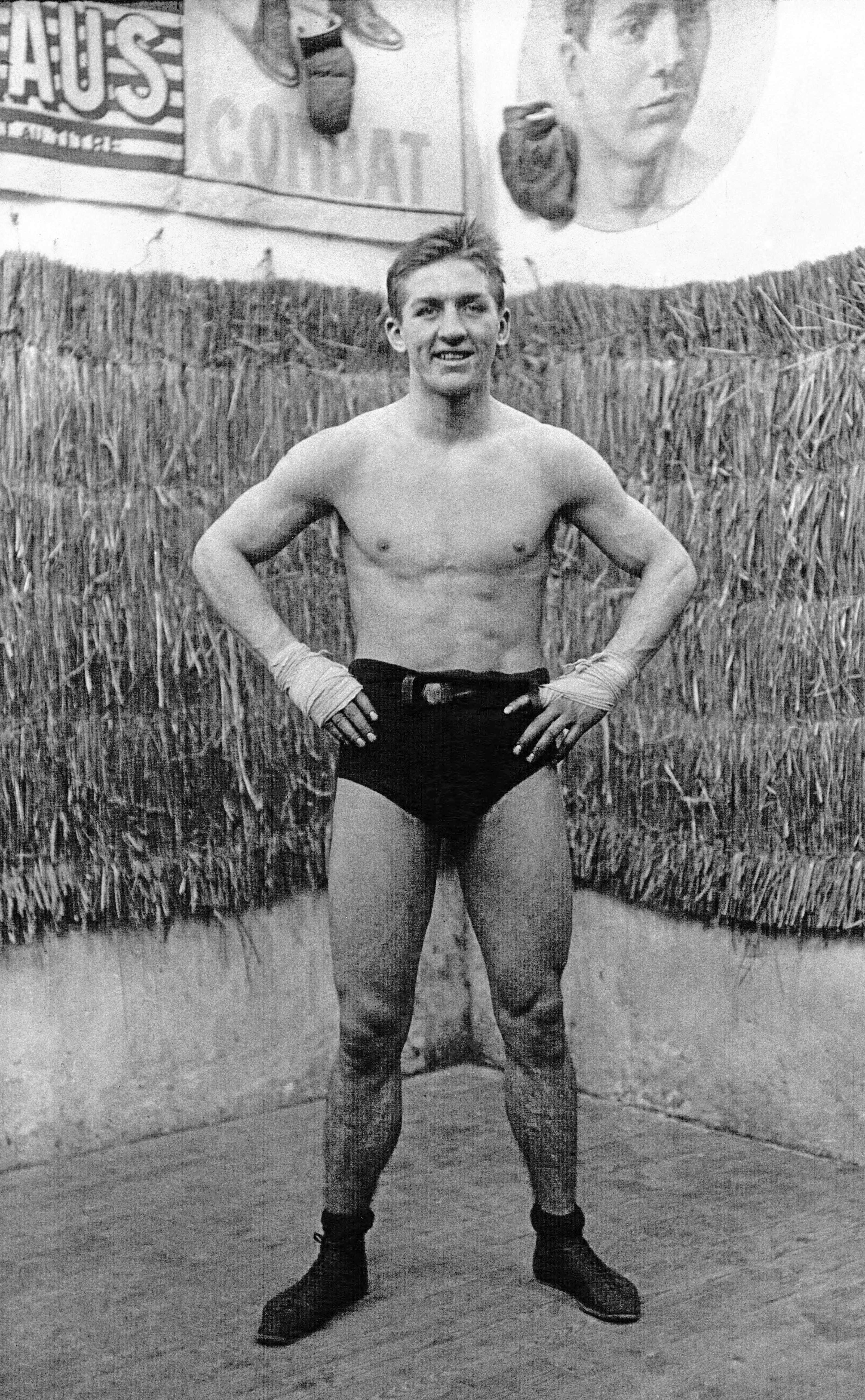 Le match Georges Carpentier - Joe Jeannette : Georges Carpentier riant.